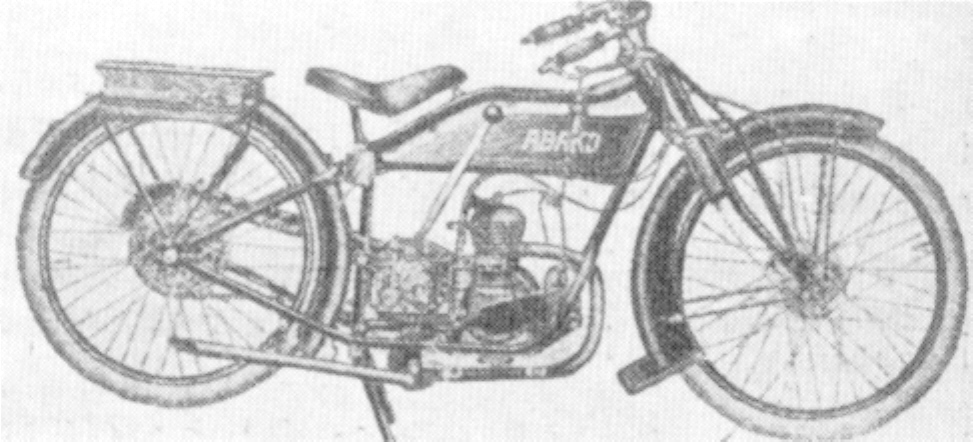 Afbeelding is meer dan zestig jaar oud